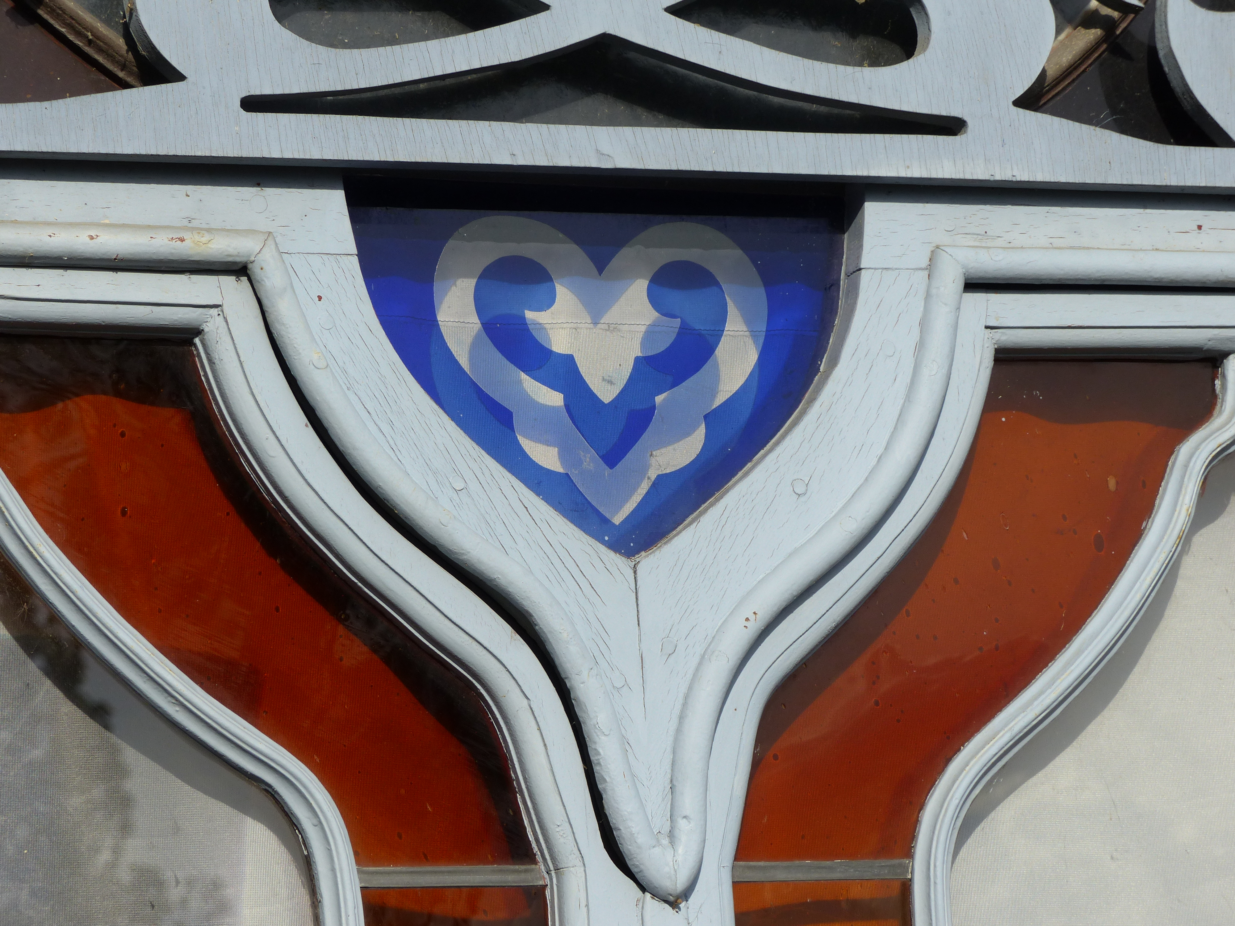 La Casamaures, Saint-Martin-le-Vinoux, Isère, France. Cette photo fait partie d'une série de 30 photos. Don à Wikimédia par Sylvie Jeanson, à l'occasion des 30 ans de l'association "La Casamaures d'hier et d'aujourd'hui", dans le cadre des Journées contributives à la Casamaures du 4 et 5 avril 2015. Photo autorisée par l'association et par la proprietaire Christiane Guichard. La Casamaures : détail vitrail coeur.